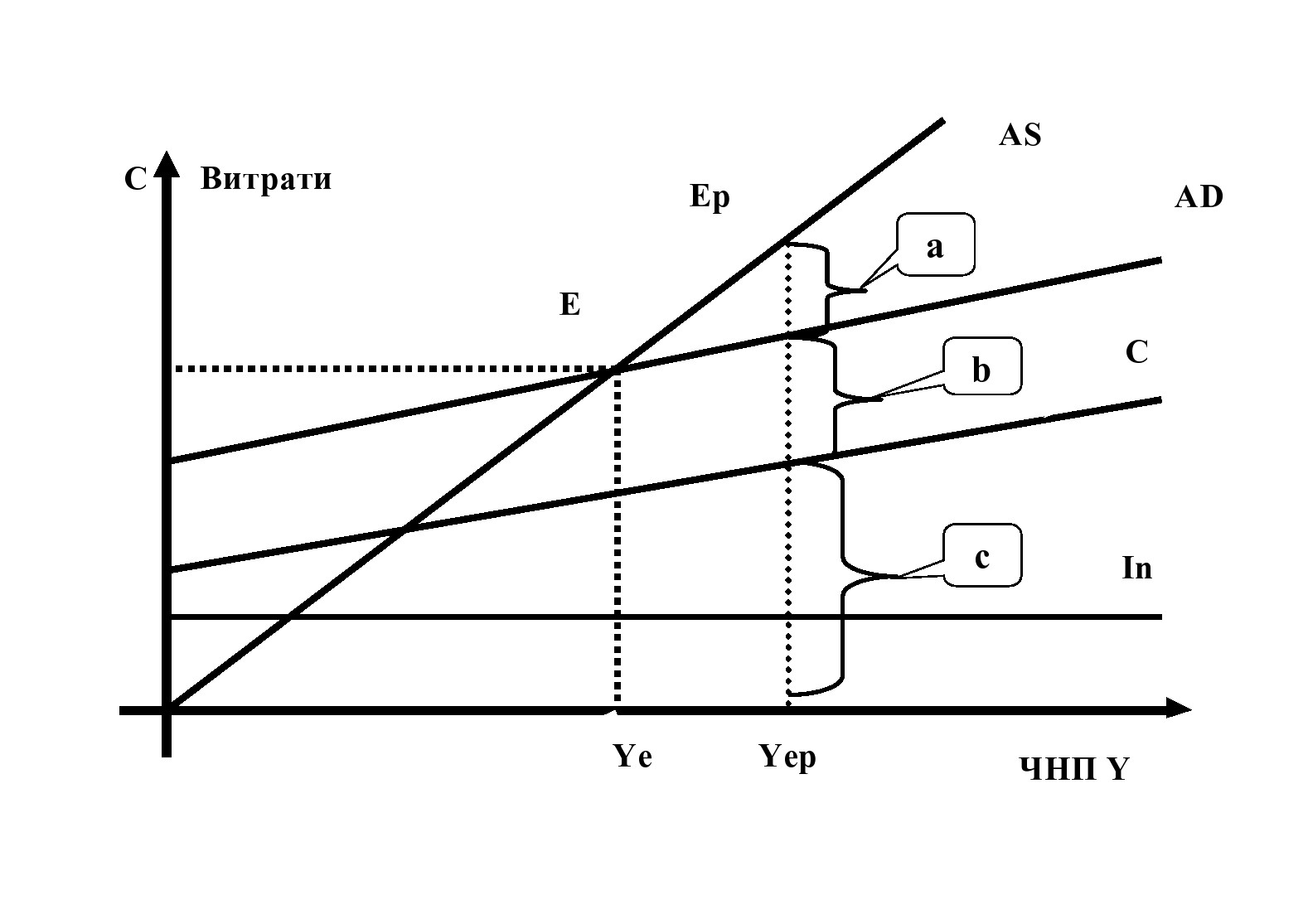 Графічна версія інтерпретації макроекономічної моделі "Кейнсіанського хреста"